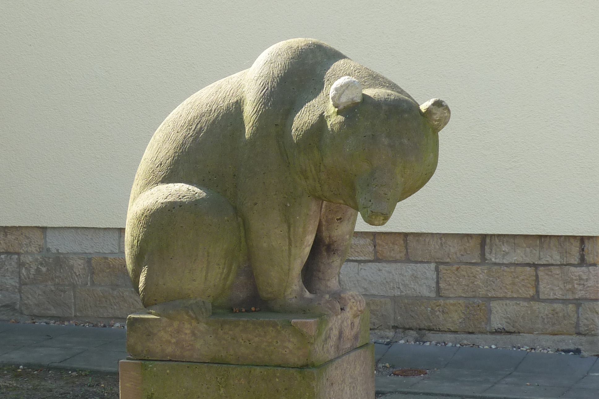 Skulptur Sitzender Bär im Innenhof zur Alten Mensa der TU Dresden